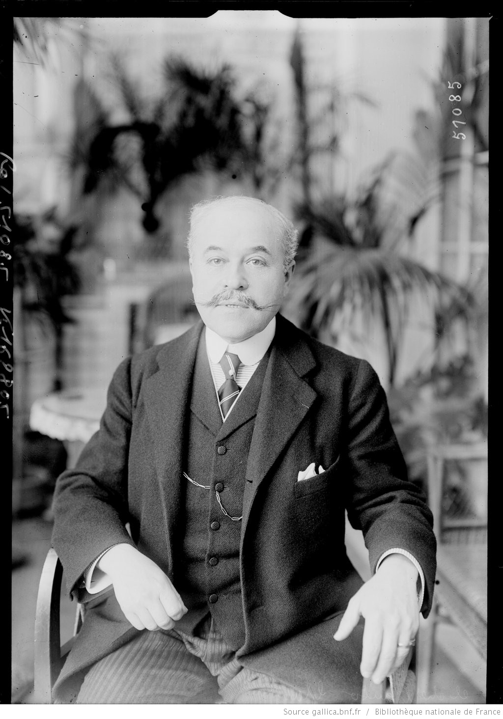 Cliché l'Auto, [Albert] Glandaz [membre du C.I.O., président de la Fédération des sociétés d'aviron] : [photographie de presse] / [Agence Rol]